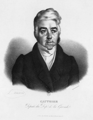 Jean-Élie Gautier est un homme politique français né à Bordeaux le 6 octobre 1781 et mort à Paris le 30 janvier 1858.